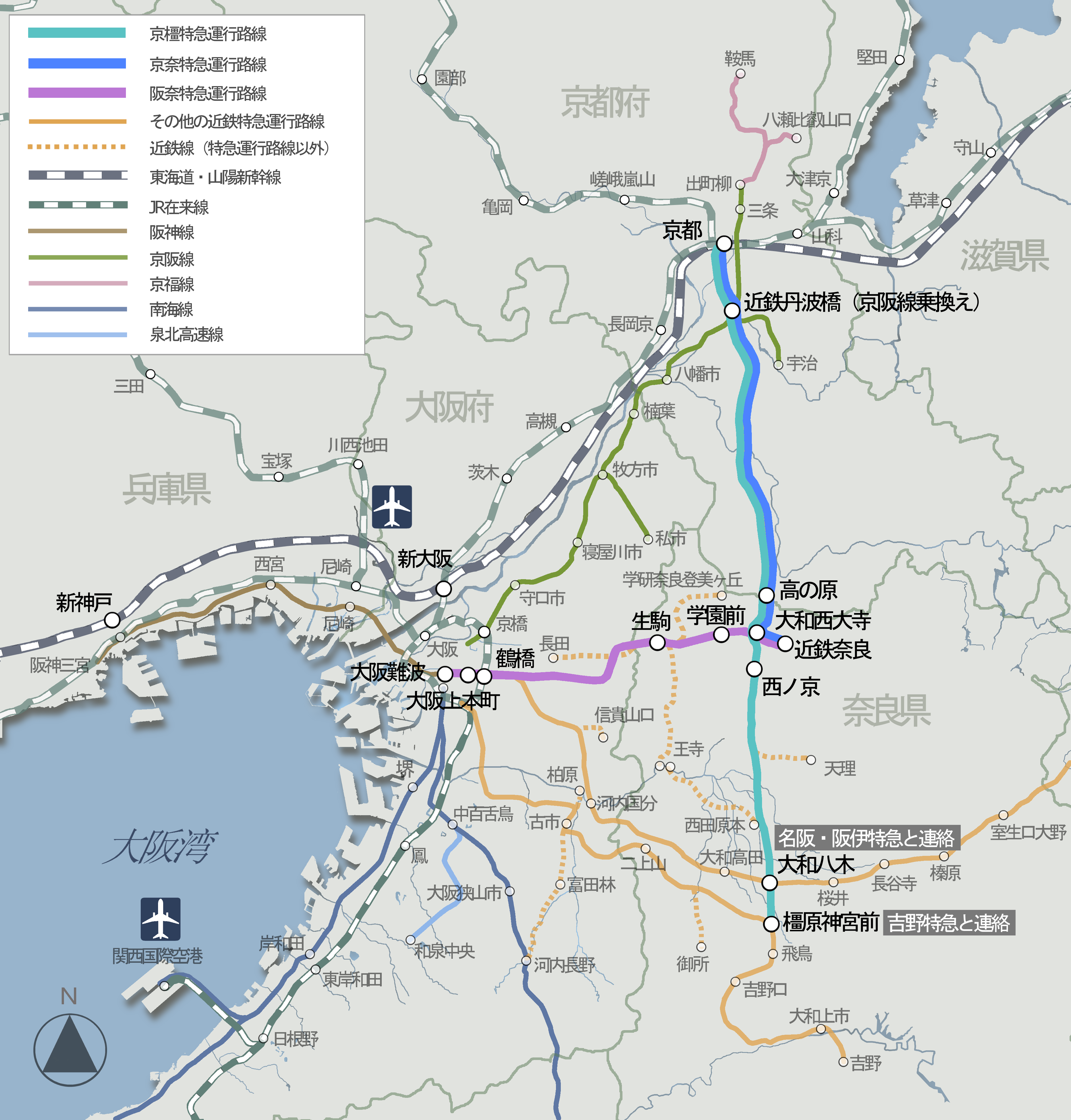 近鉄特急 京橿・京奈・阪奈特急ルートマップ